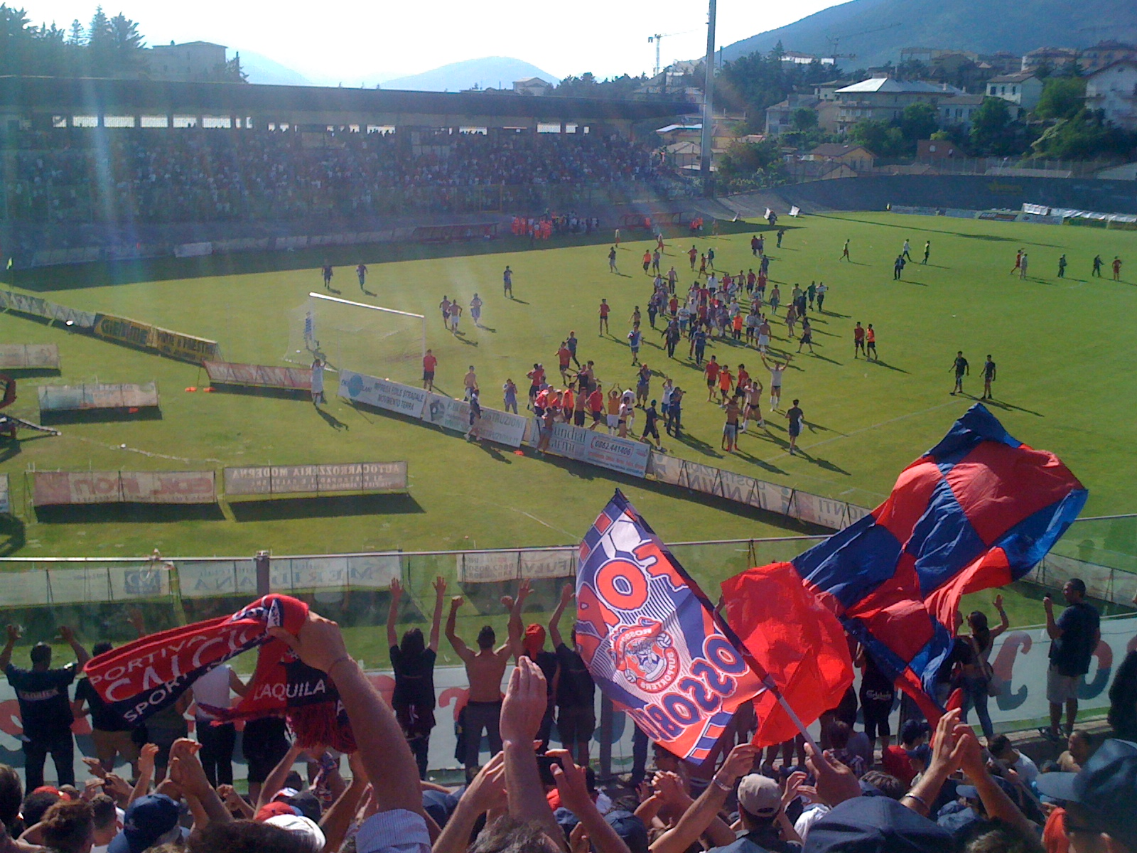 Fischio finale di L'Aquila-Teramo (finale play-off di Lega Pro Seconda Divisione 2012-2013)